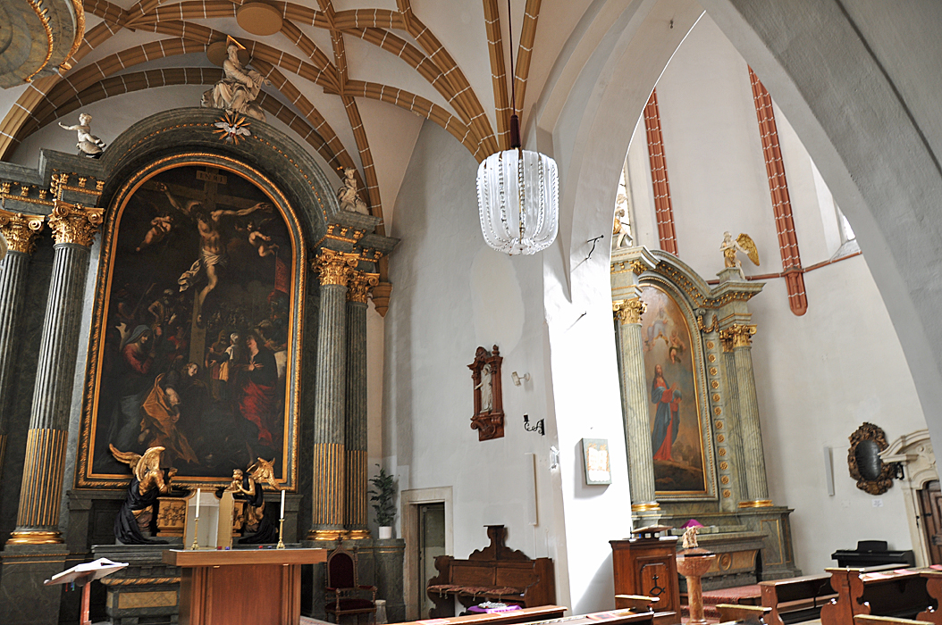 Salvatorkapelle Wien. Altarraum.